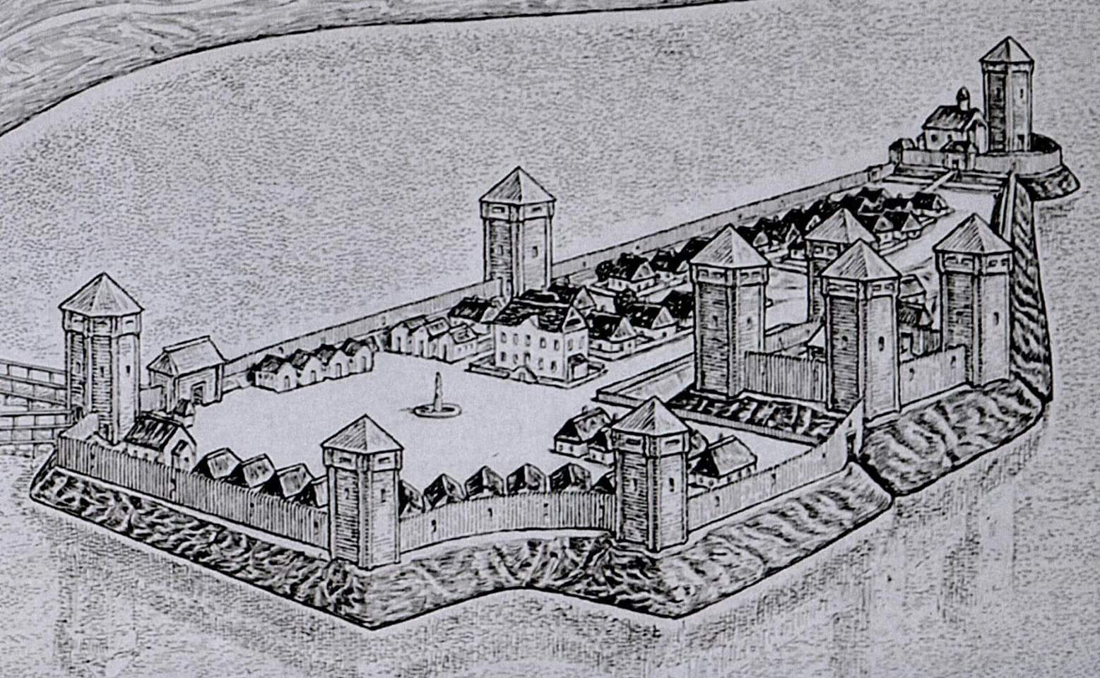 Графічна реконструкція плоскирівського замку 17ст. Автор ідеї Володимир Захар'єв, художник Юрій Адамчук